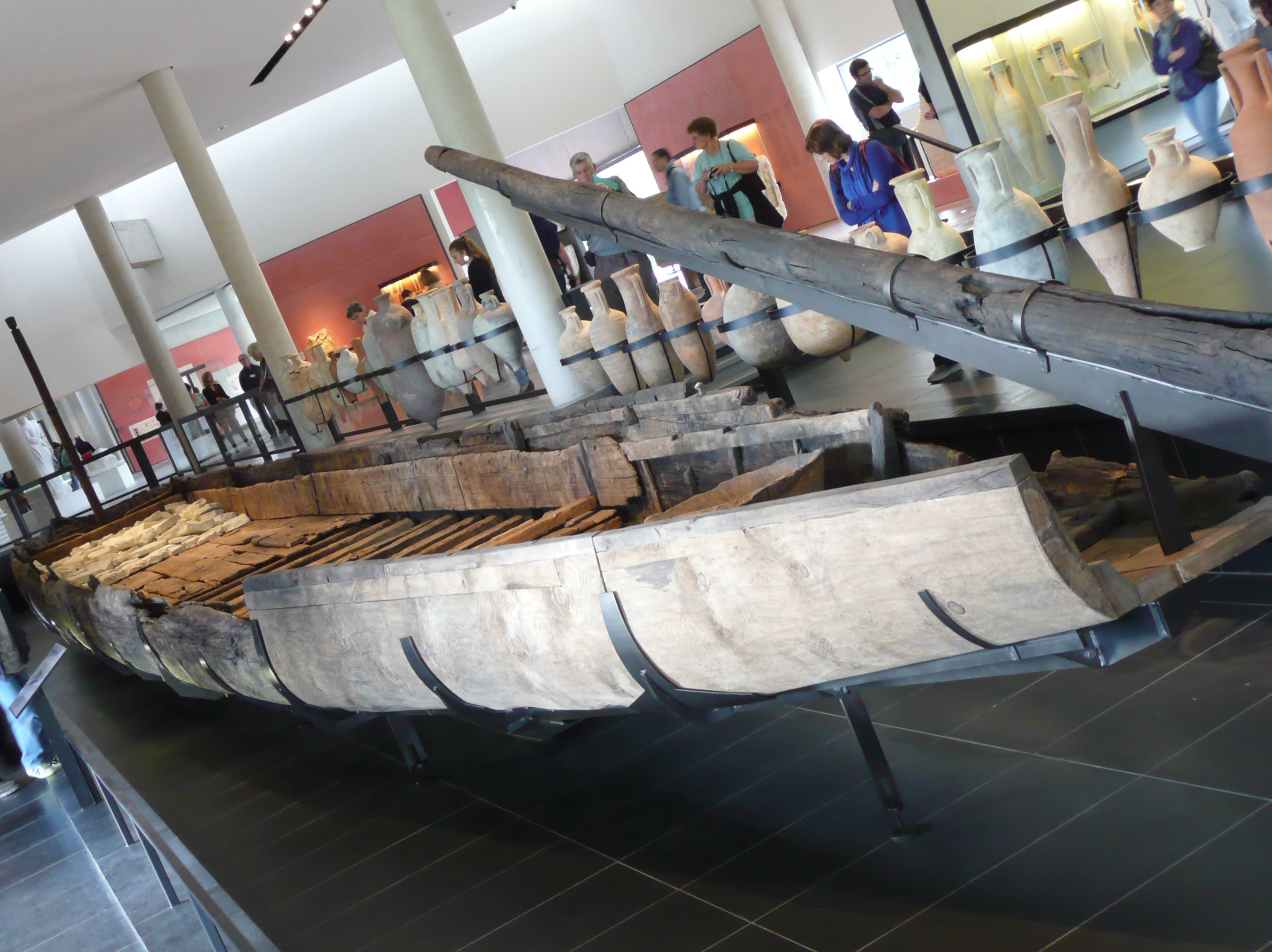 A Arles (Bouches-du-Rhône, France), au musée départemental de l'Arles antique (MD2A), chaland gallo-romain construit vers l'an 50, de 31 mètres de long pour 3 de large, découvert en 2004 par Luc Long, et sorti de l'eau durant l'été et l'automne 2011 sous la direction de Sabrina Marlier, présenté dans une extension du musée inaugurée le 04 octobre 2013.